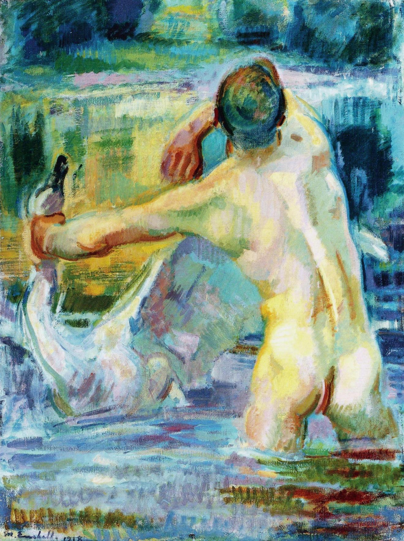 Magnus Enckellin maalaus.